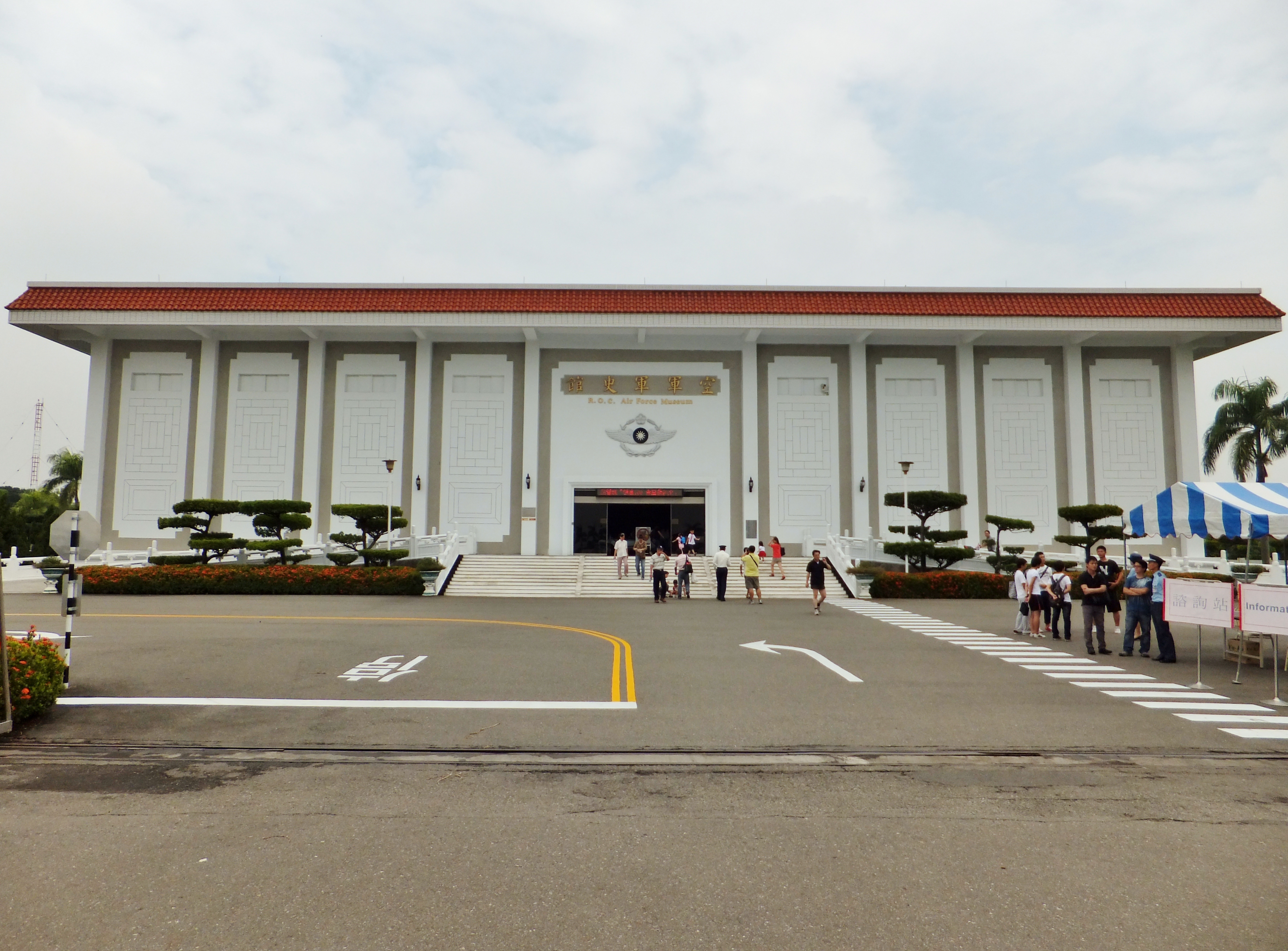 空軍軍史館正面，攝於2011年空軍岡山基地營區開放活動。